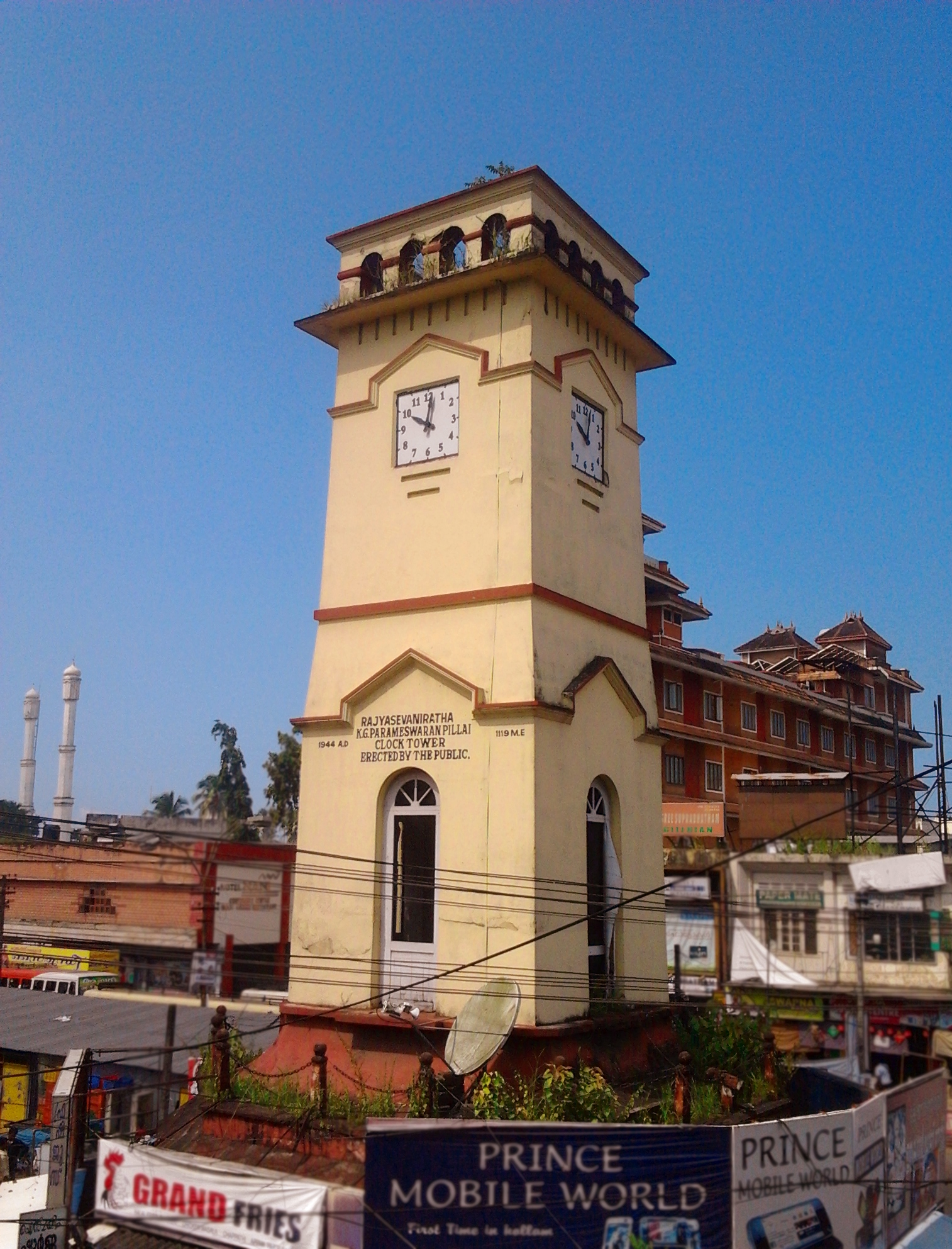 കൊല്ലം ക്ലോക്ക് ടവർ